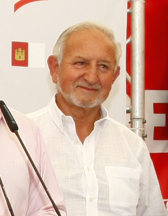 Visita a la Feria de San Isidro de Talavera de la Reina